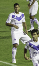 Estadio Centenario, Montevideo, Uruguay. Peñarol: Enrique Bologna; Alejandro González, Carlos Valdez, Darío Rodríguez, Aureliano Torres; Marcel Novick, Sebastián Cristóforo (m.79, Ignacio Nicolini), Fabián Estoyanoff (m.79, Sebastián Gallegos), Matías Aguirregaray; Marcelo Zalayeta y Juan Manuel Olivera (m.65, Carlos Núñez). Entrenador: Jorge Da Silva. Vélez Sarsfield: Sebastián Sosa; Gino Peruzzi, Fabián Cubero, Sebastián Domínguez, Emiliano Papa; Iván Bella (m.85, Agustín Alioni), Francisco Cerro, Fernando Gago (m.29, Lucas Romero), Federico Insúa; Ezequiel Rescaldani (m.72, Jonathan Copete) y Lucas Pratto. Entrenador: Ricardo Gareca. Gol: 0-1, m.86: Lucas Pratto. Árbitros: El brasileño Heber Lopes amonestó a Núñez y Cerro. Camera: Canon EOS 5D Mark II 5 ISO: 640 Published